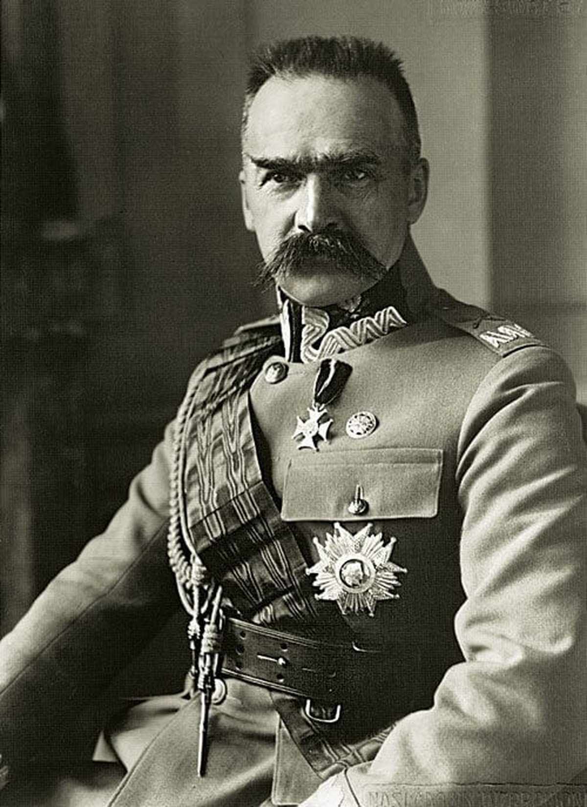 Retrato del mariscal polaco Josef Pilsudski.